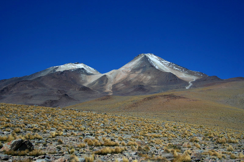 L'Uturuncu Volcan en Bolivie Altitude 6008m